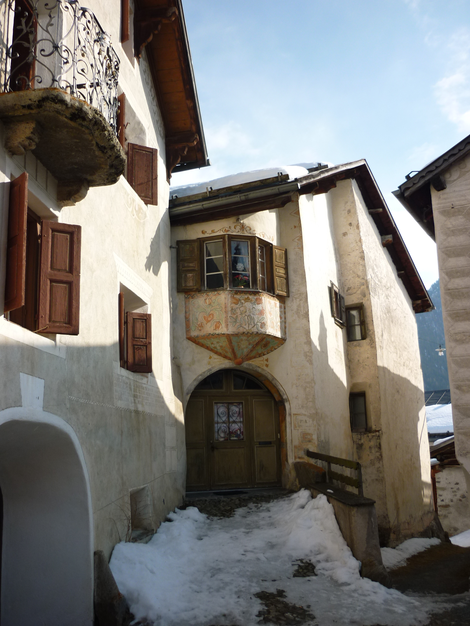 Haus 48, Guarda GR, Schweiz